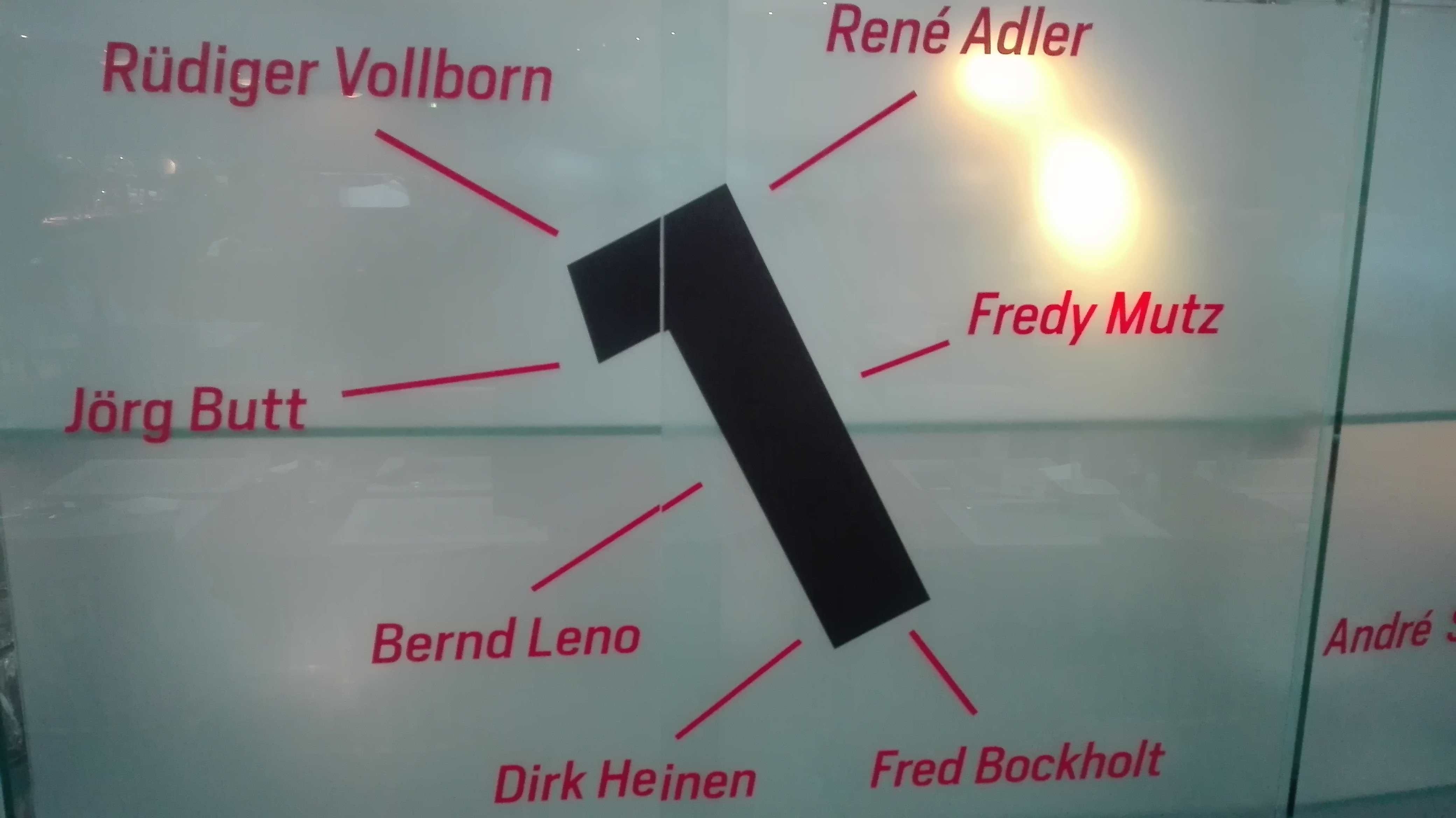 Gestaltete Trennwand mit bekannten Torhütern von Bayer Leverkusen (Bild aus dem Lindner Hotel an der BayArena)